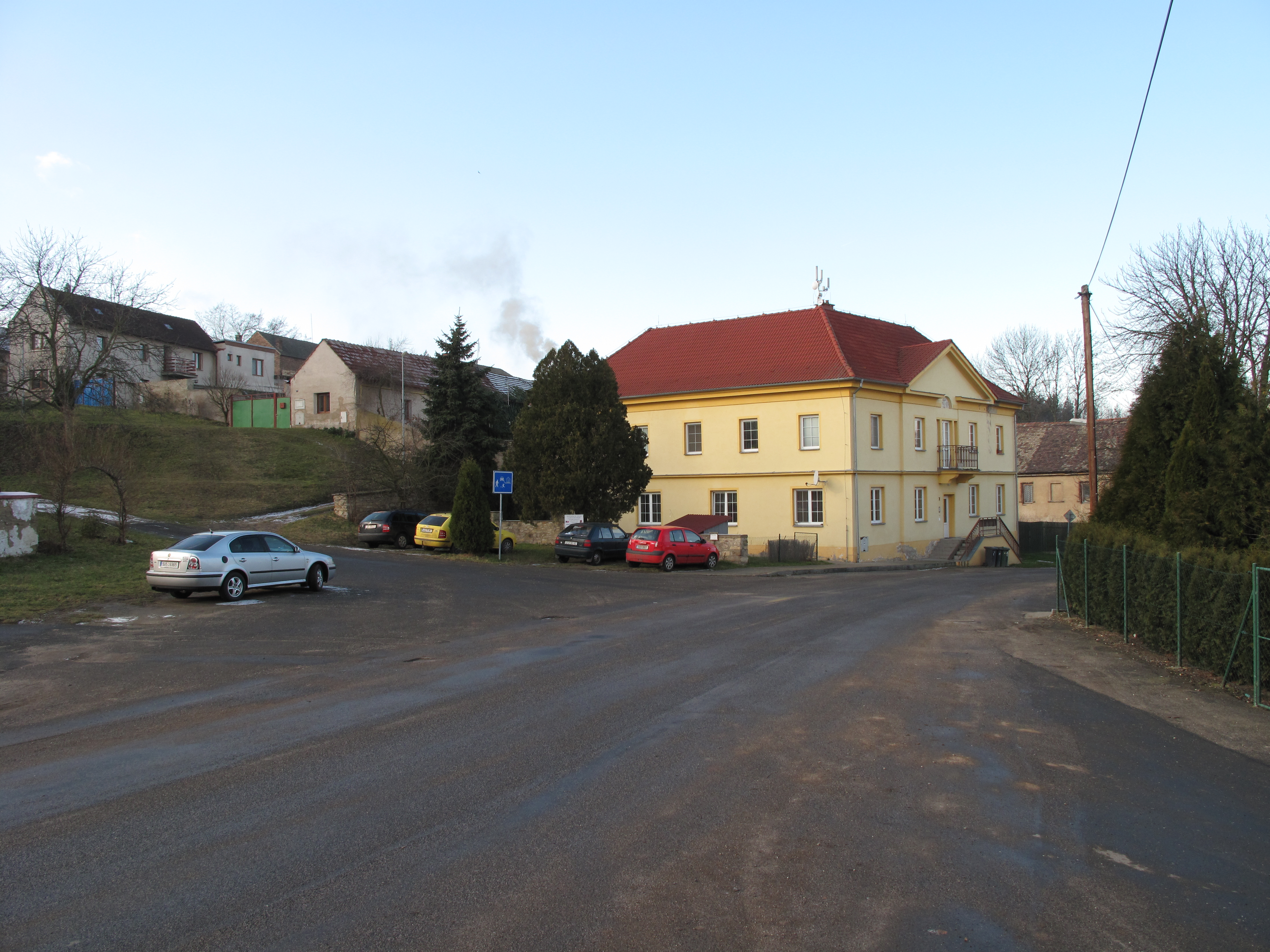 Silnice v Dušníkách. Okres Litoměřice, Česká republika.